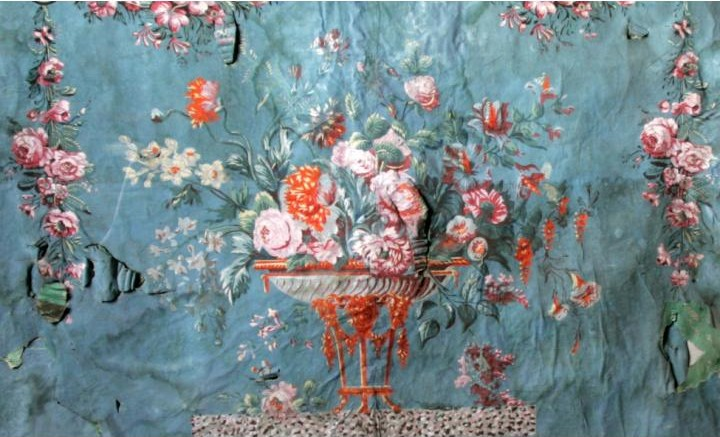 Papier peint , XVIII, Bibliothèque de Buffon